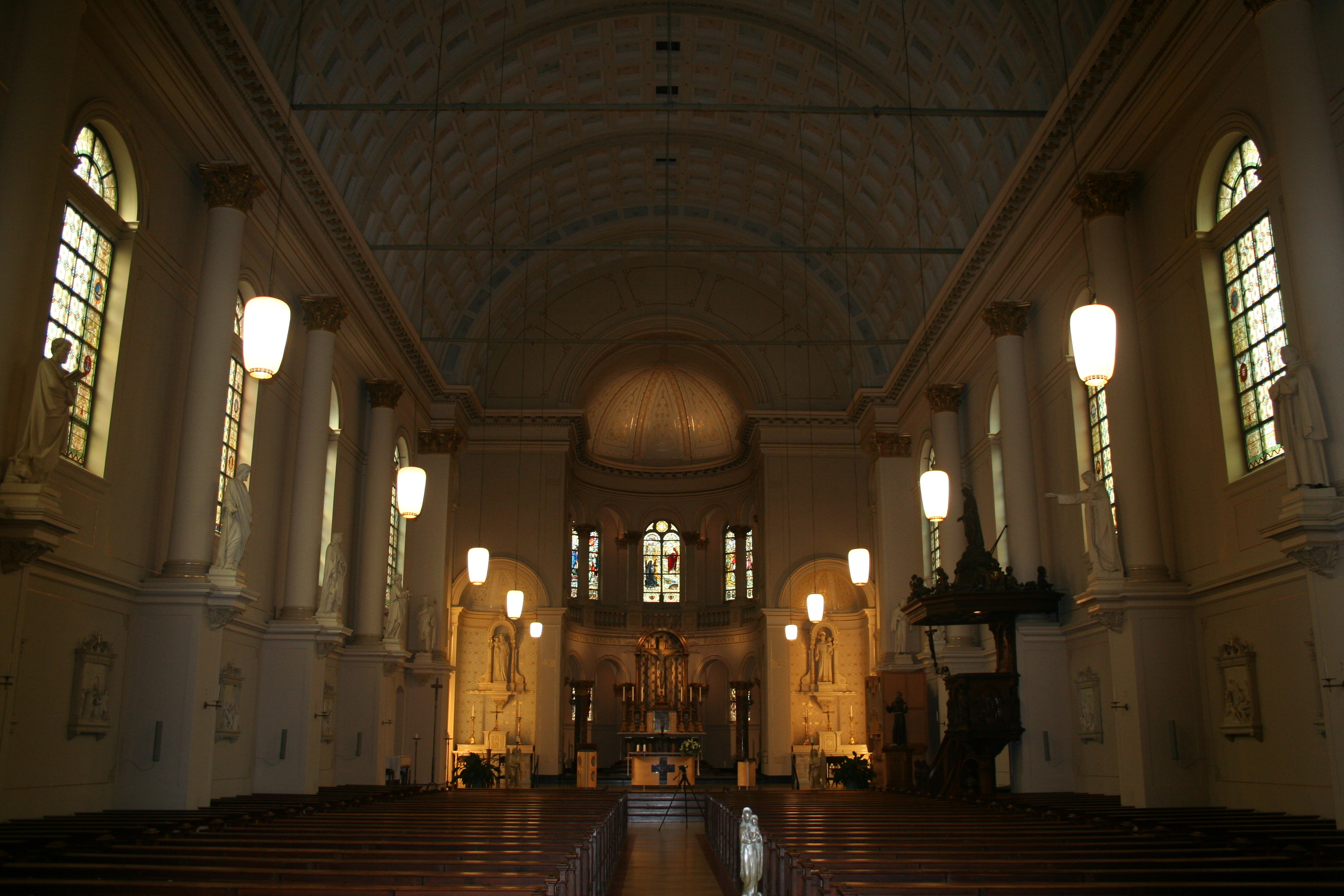 Hartebrugkerk te Leiden. Deze foto heb ik (Robert Smit) genomen met mijn canon eos 350D